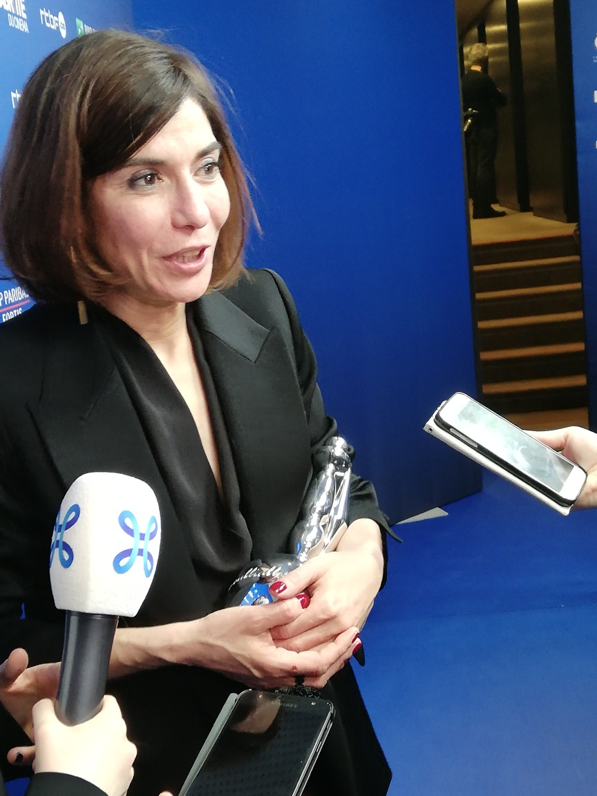 Photo Call Magritte 2019